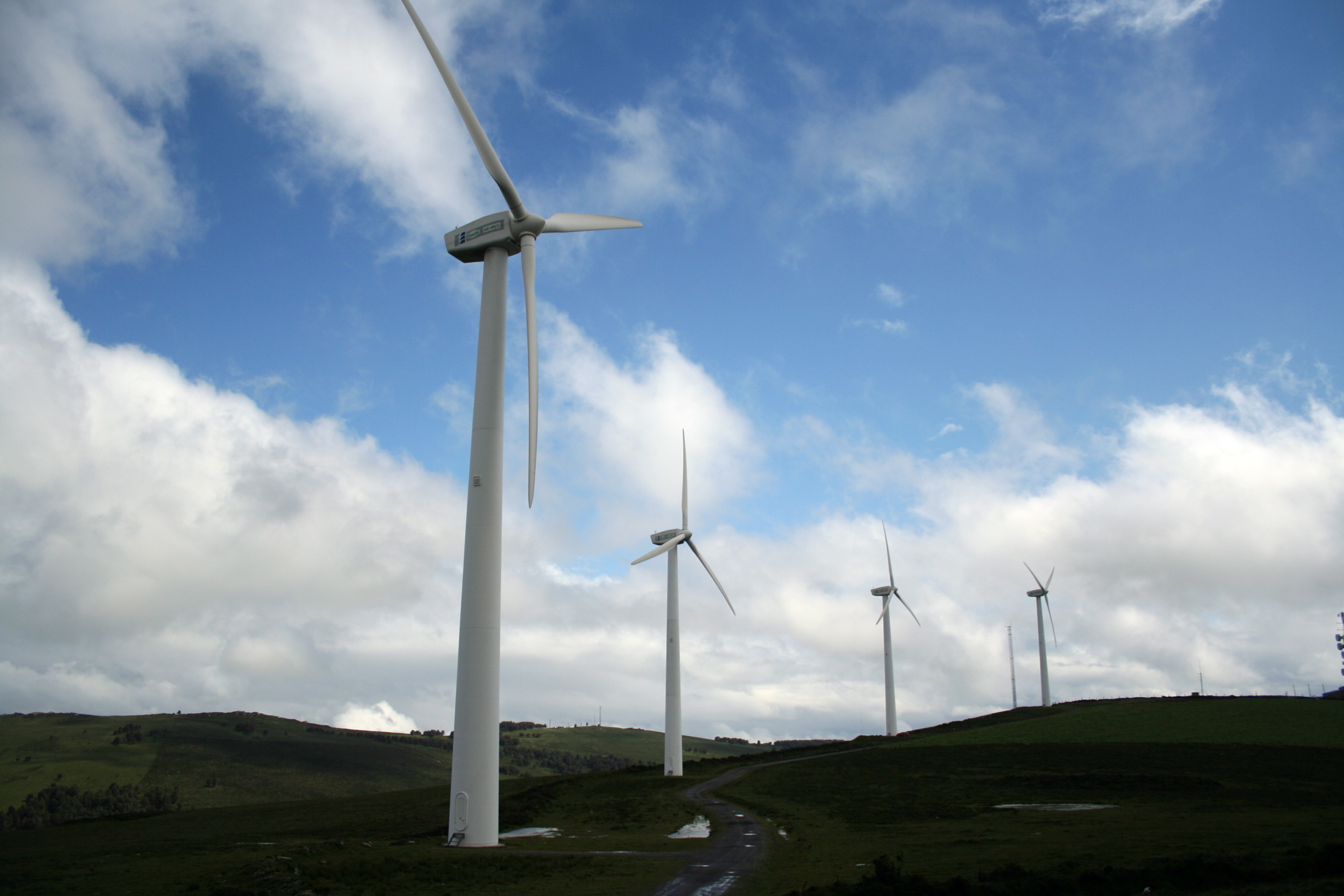 Navelgas